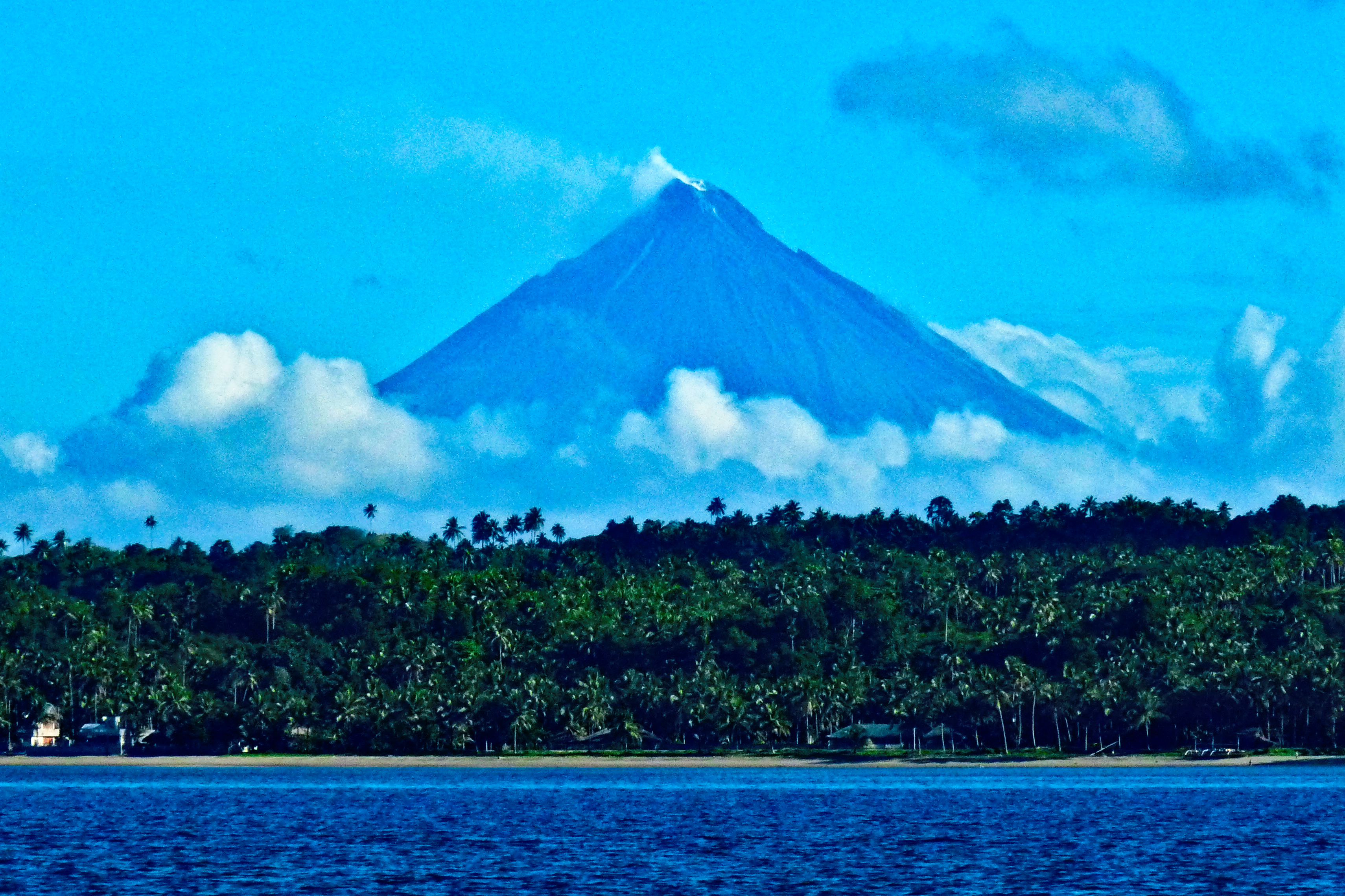 Mayon Volcano